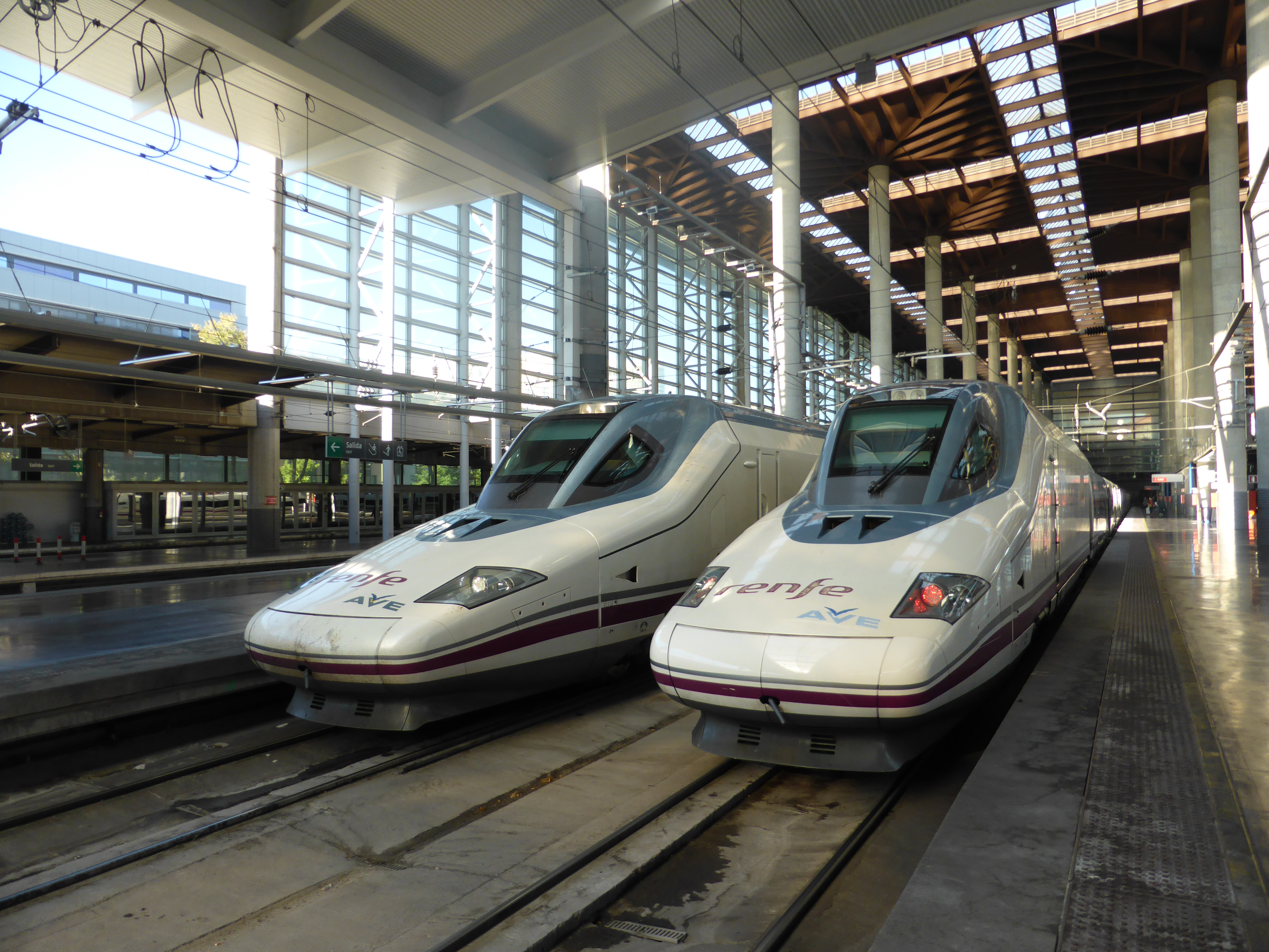 Interior de la estación de alta velocidad Madrid Puerta de Atocha. Se encuentran estacionados dos trenes AVE (Alta Velocidad Española), con locomotoras "Pato" de Bombardier, en los extremos, y ramas tipo Talgo 350, formando parte de la Serie 112 de Renfe (Renfe Operadora). El tren de la derecha se encuentra listo para salir con destino Valencia (estación Joaquín Sorolla). La locomotora lleva la matrícula: 9 6 719 -112 005- 4